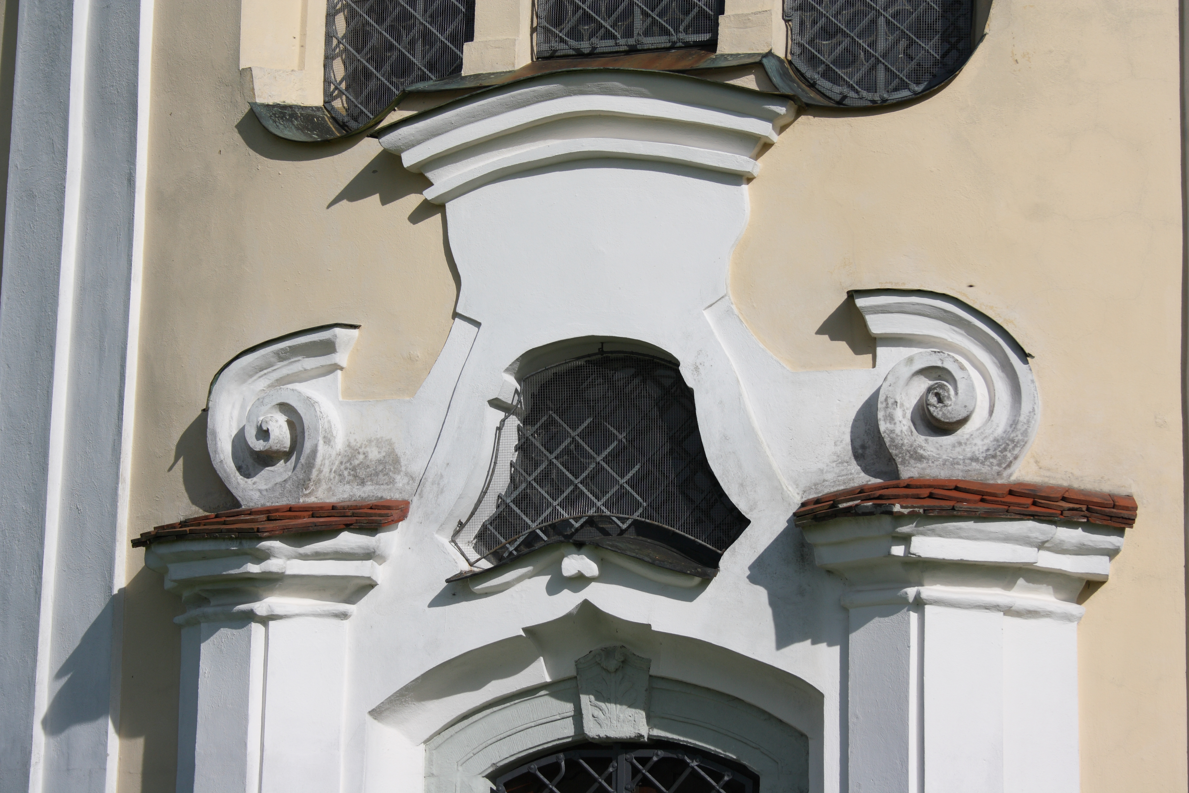 Katholische Kapelle Herrgottsruh in Lauingen, Dillinger Straße 62 (am Auwald)